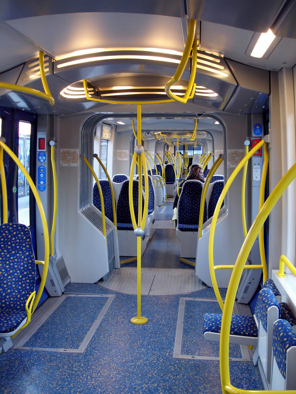 Intérieur d'une rame Avanto U 25500 de la ligne T4 (Seine-Saint-Denis).